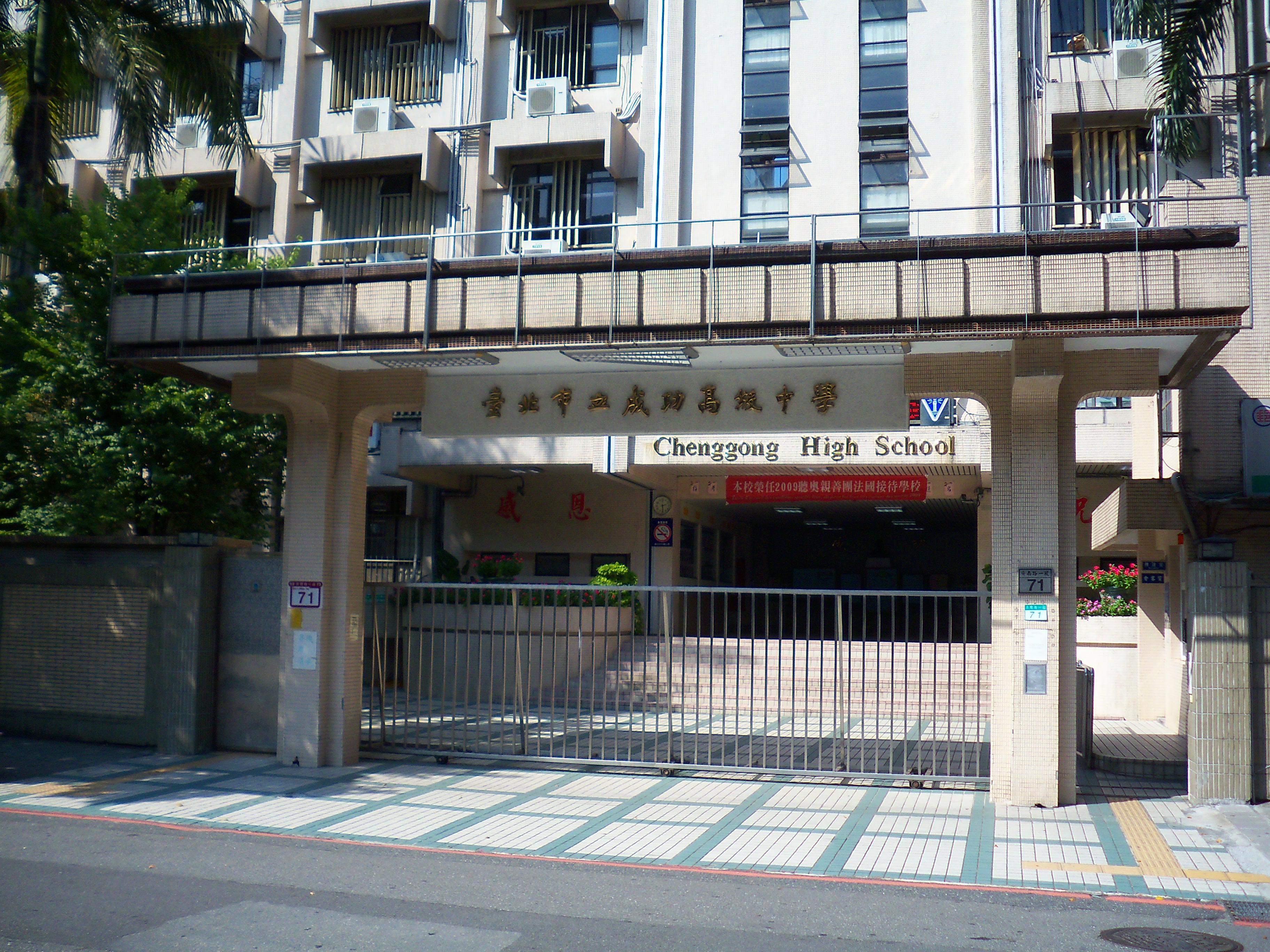 台北市立成功高級中学正門。